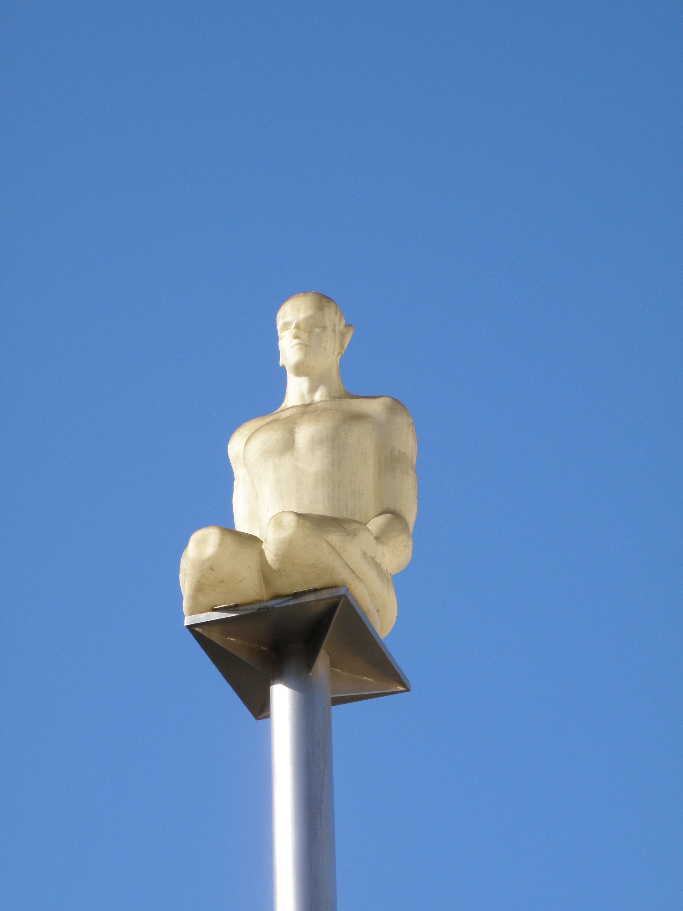 Estàtua en la Biblioteca Central Xavier Amorós de Reus, Baix Camp. Vista des del pati ca a l'exterior.